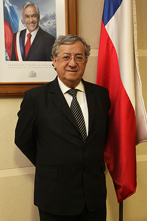 Waldo Mora Longa, intendente de la Región de Antofagasta.